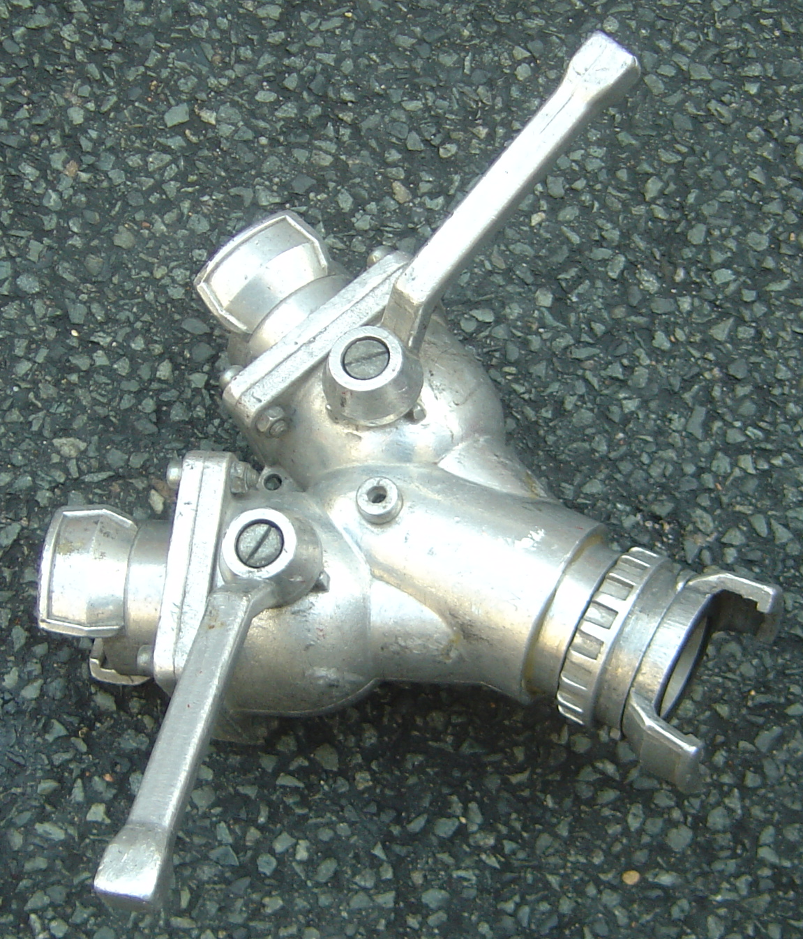 Brigade de Sapeurs-Pompiers de Paris, rue du Cardinal Lemoine (entraînement)